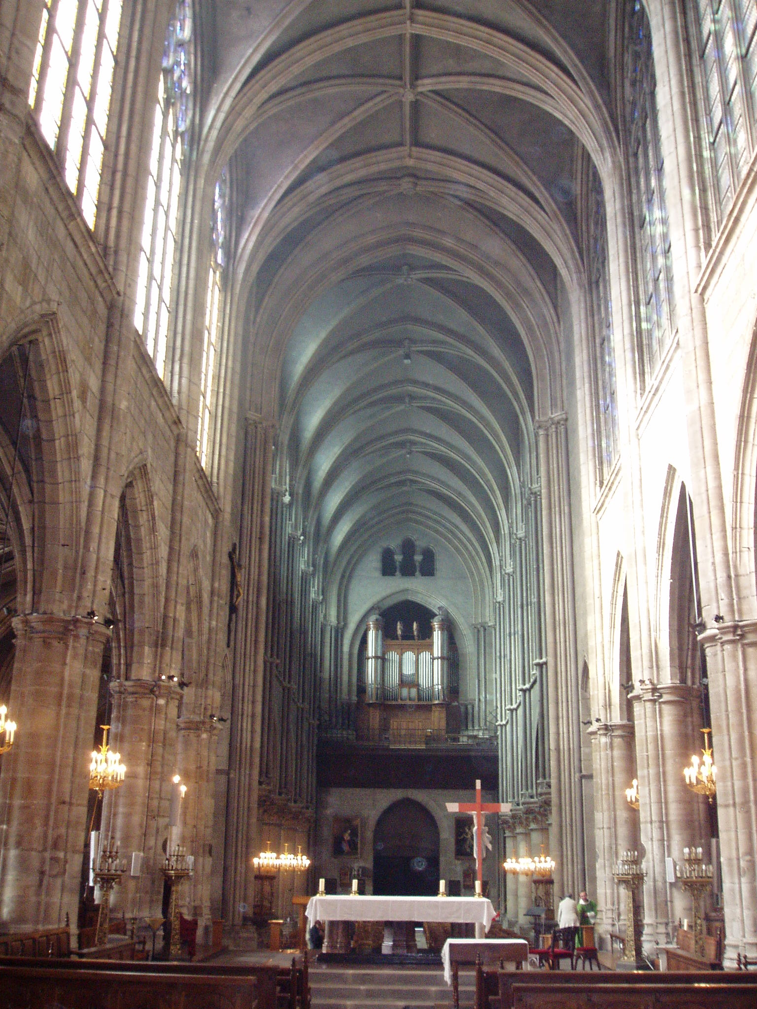 Nef de la cathédrale de Moulins (Allier-France), avec les grandes orgues.